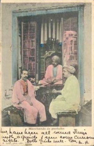 Marchands de parfum, Tunis, Tunisie